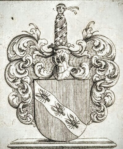 Wappen des Frankfurter Patriziergeschlechts Uffenbach